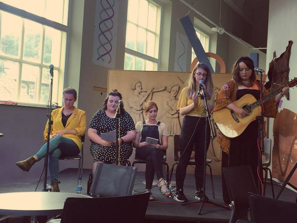 Cywion Cranogwen yn perfformio yn Sesiwn Fawr Dolgellau, Gorffennaf 2018